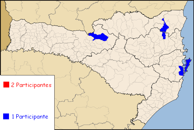 Mapa das cidades participantes do Campeonato Catarinense de Futebol Feminino 2009